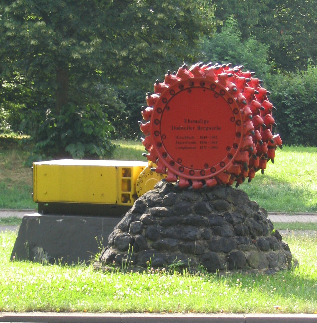 Denkmal für die ehemaligen Bergwerke von Dudweiler (Saarbrücken/Deutschland): Bergwerk Hirschbach, Bergwerk Jägersfreude, Bergwerk Camphausen.